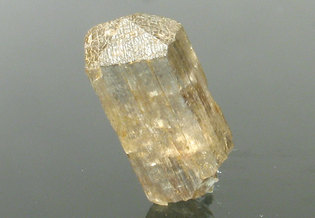 skapolit, pochodzenie Madagaskar, Benono; autor zdjęcia Stowarzyszenie Spirifer